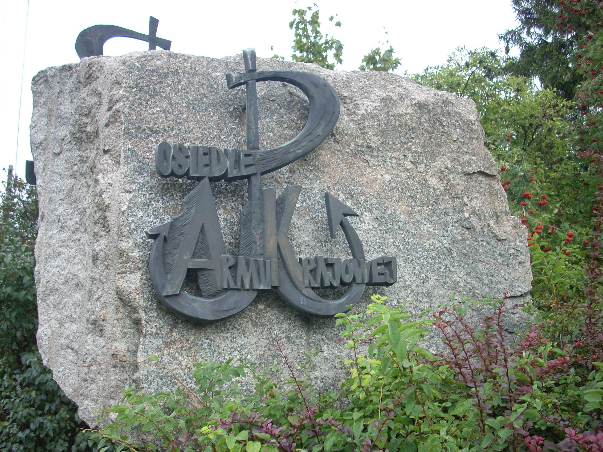 Zdjęcie pomnika przy osiedlu Armii Krajowej w Lesznie.